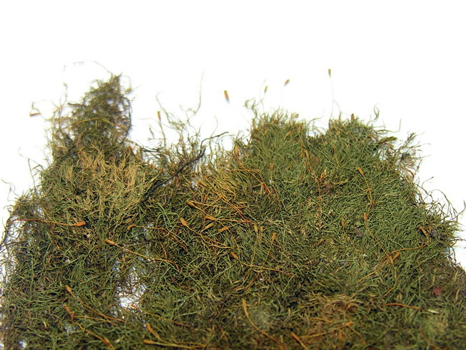 Paprastoji bukasnapė (Amblystegium serpens (Hedw.) Schimp.), Fam. Bukasnapiniai (Amblystegiaceae), Fotografuota iš asmeninio herbaro